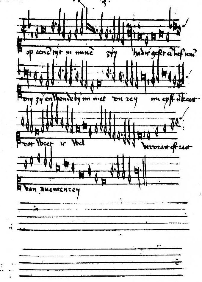 Detail van de partituur van een driestemmig Nederlands lied "Op eenen tijd in minen zijn", uit een Italiaans handschrift van de 15e eeuw, compositie toegeschreven aan Johannes Pullois, genoteerd in witte mensurale notatie